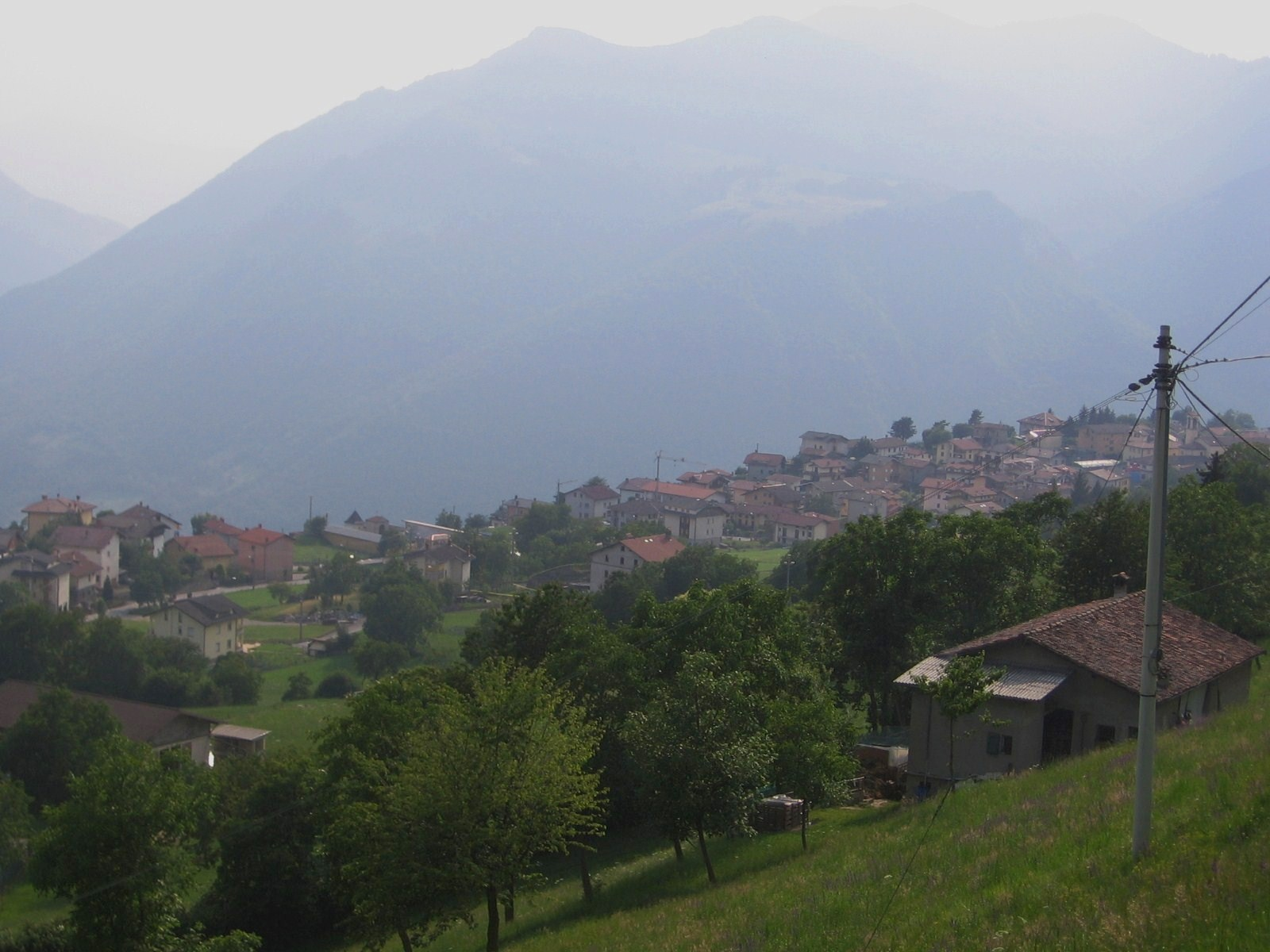 Bossico, Bergamo, Italy